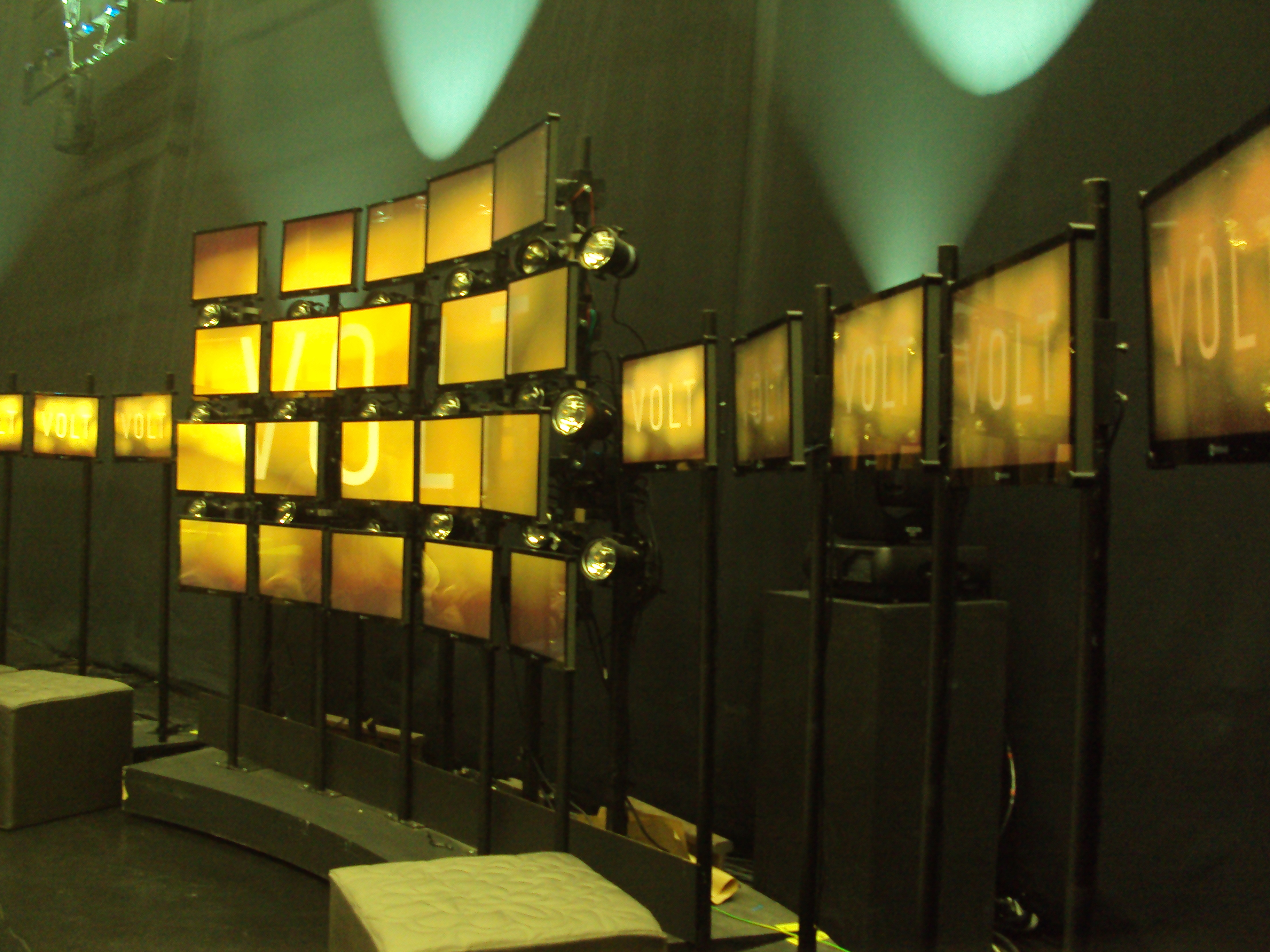 Achtergrondschermen van VOLT